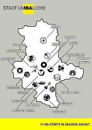 Karte der IBA-Städte Auch wenn diese Datei unter einer freien Lizenz steht oder nicht urheberrechtlich geschützt ist, kann ihre Verwendung und/oder Veränderung gegebenenfalls durch andere rechtliche Bestimmungen außerhalb des Urheberrechts eingeschränkt sein.